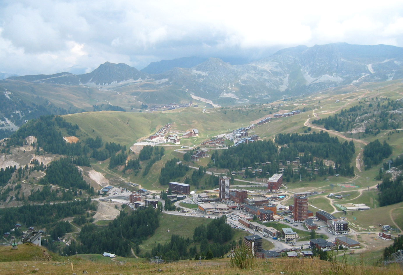 Zicht op een deel van Plagne Centre in de zomer, deel van het (ski)gebied van La Plagne